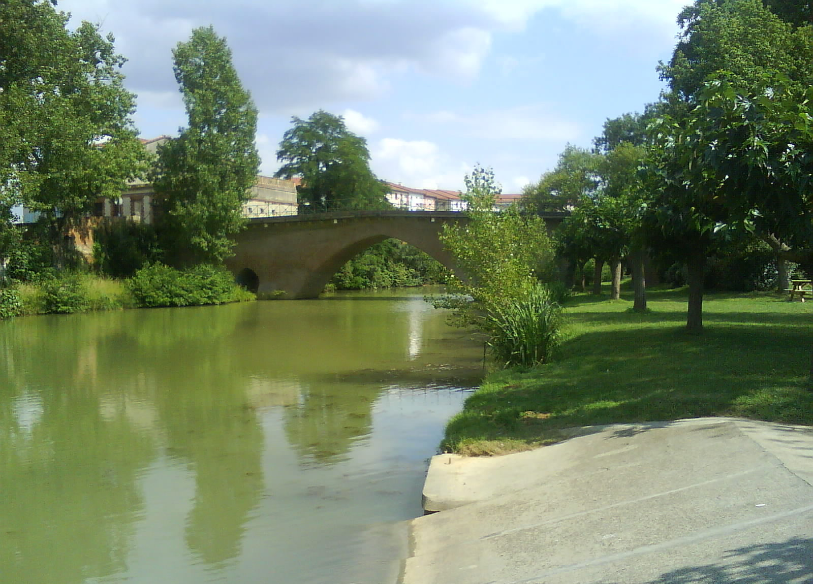 Pont de Save à Grenade (Haute-Garonne, Midi-Pyrénées, France).